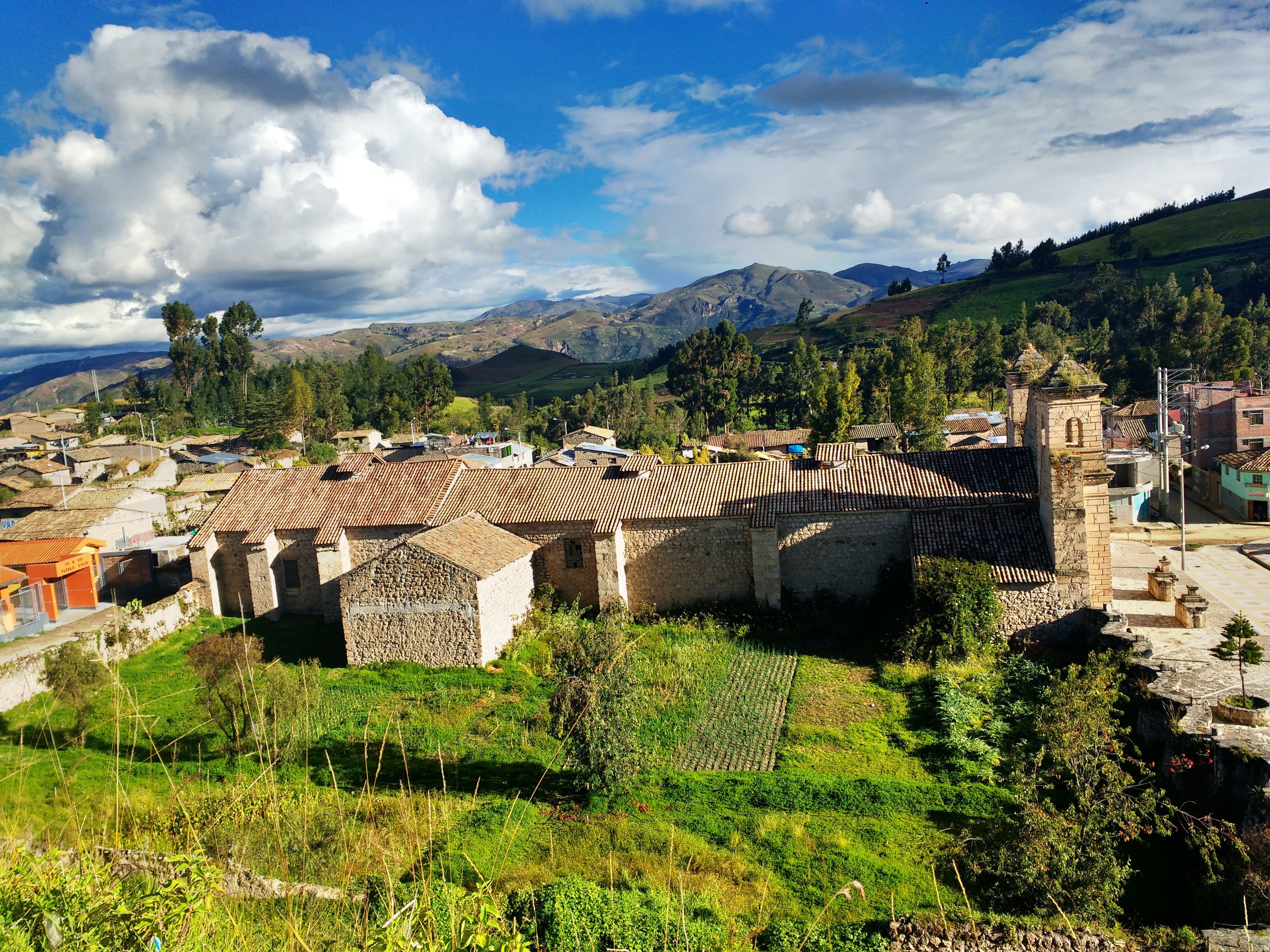 Foto lateral del monumento histórico de Acobamba.